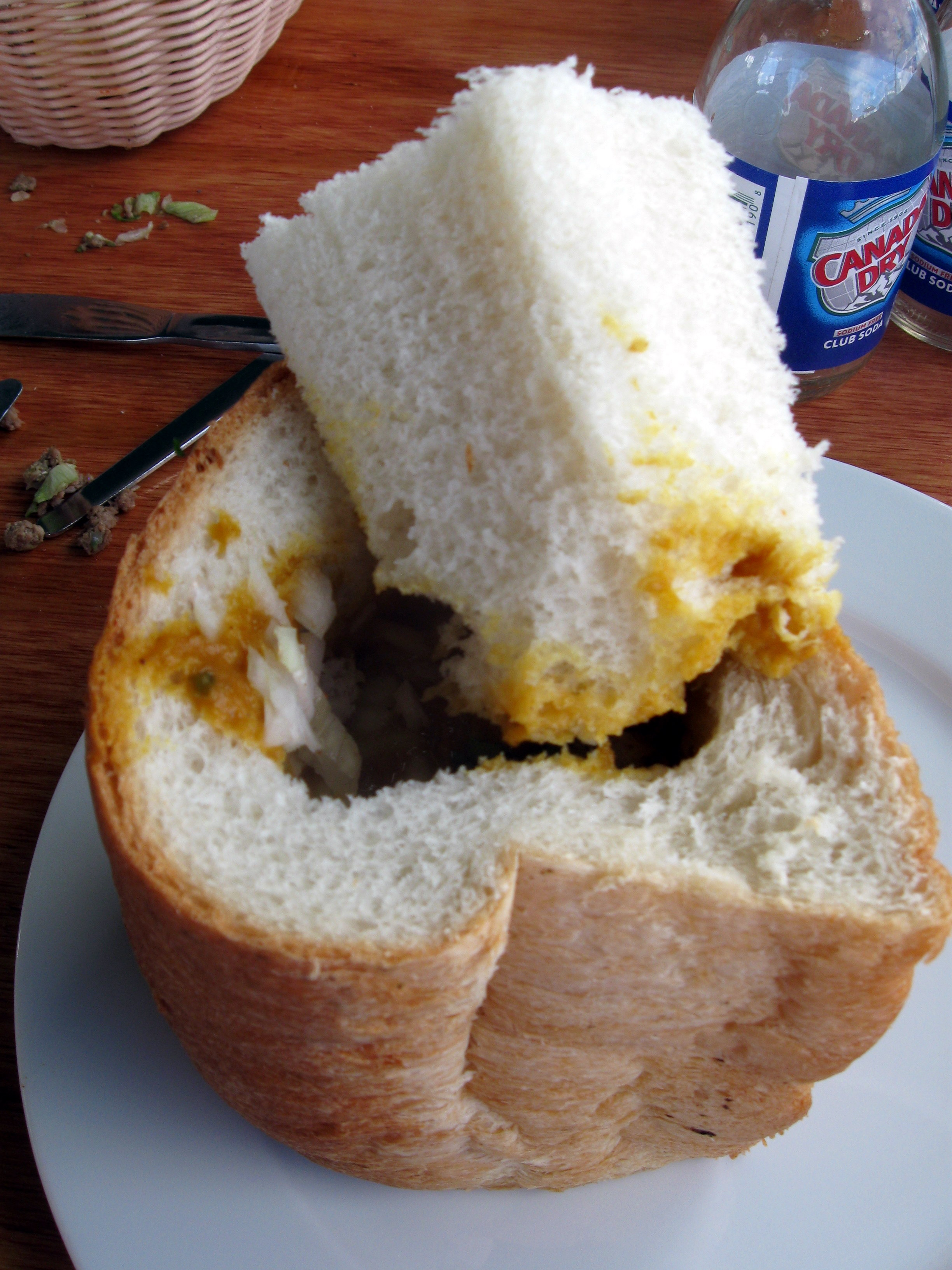 (cc) David Berkowitz